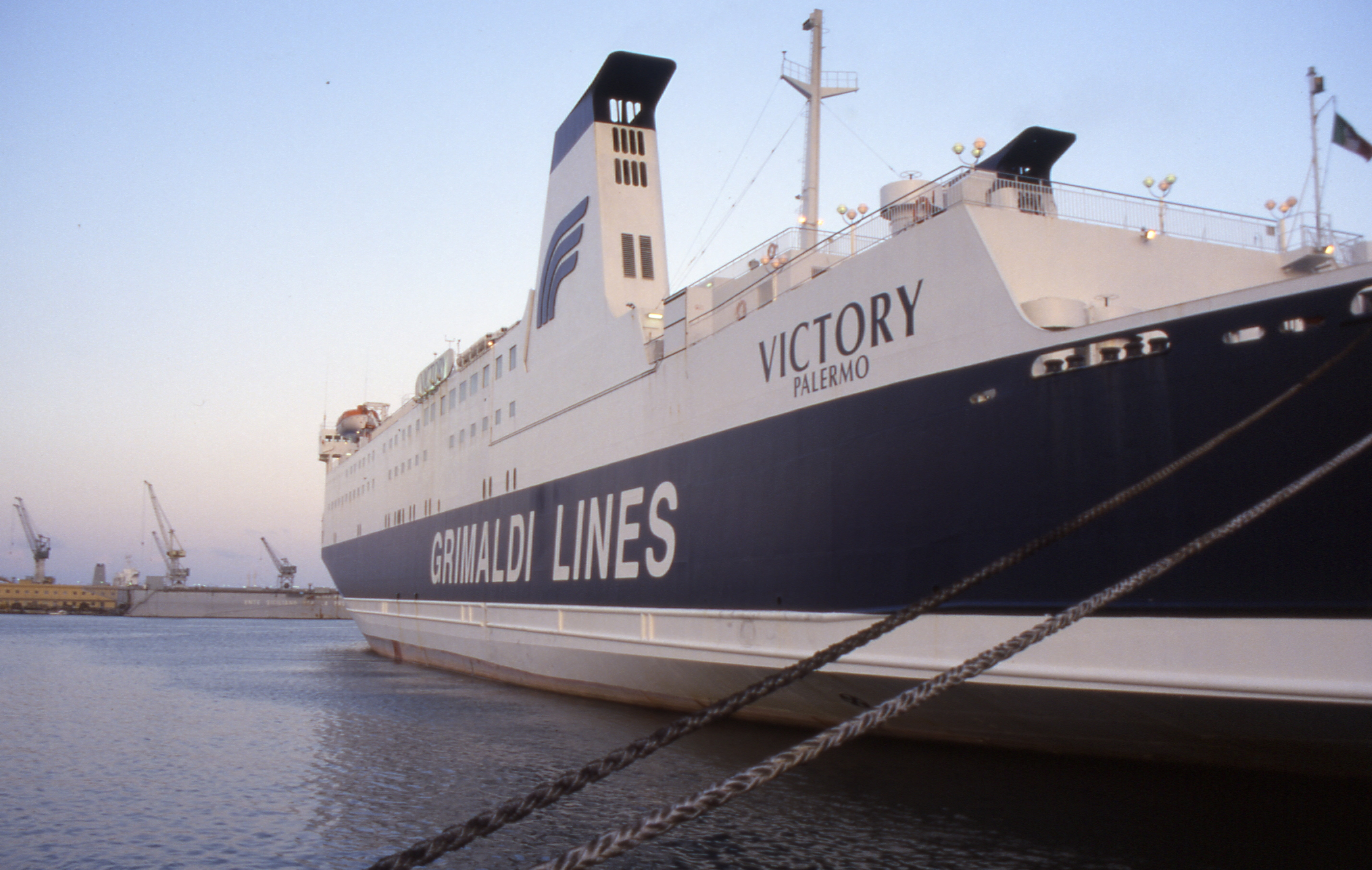 Fähre im Hafen von Palermo